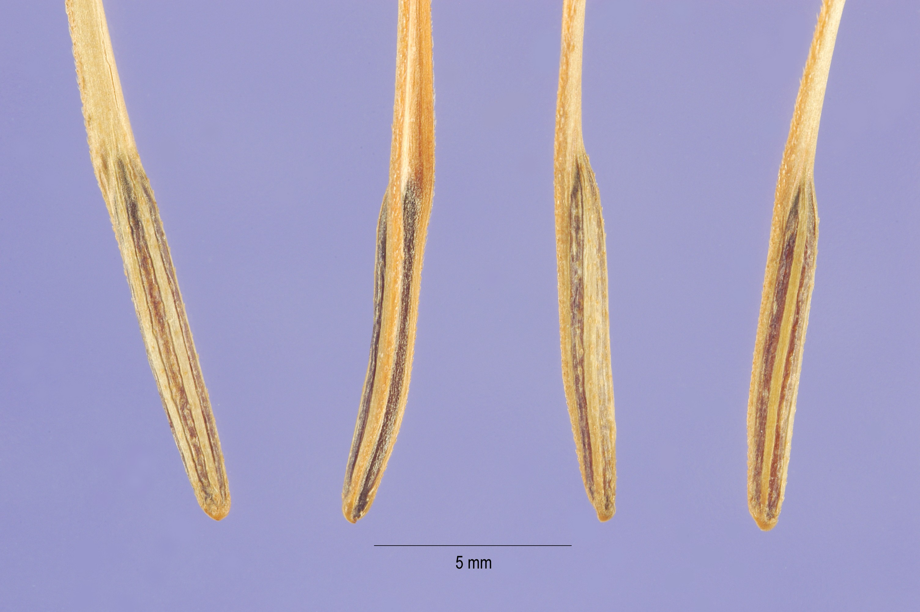 Scandix pecten-veneris fruits